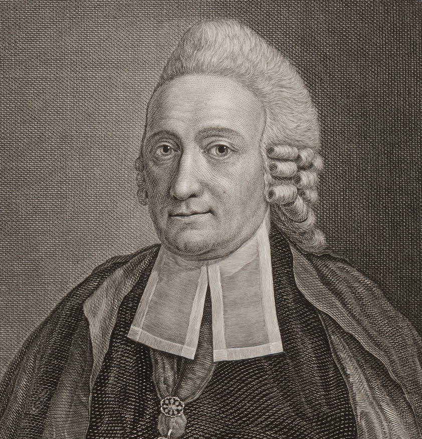 Depicted person: Johann Friedrich Burscher (1732-1805) deutscher lutherischer Theologe